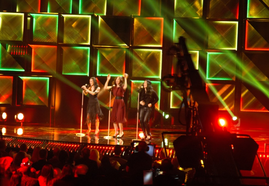 Hiszpański zespół Las Ketchup podczas 1. półfinału "Melodifestivalen 2016".